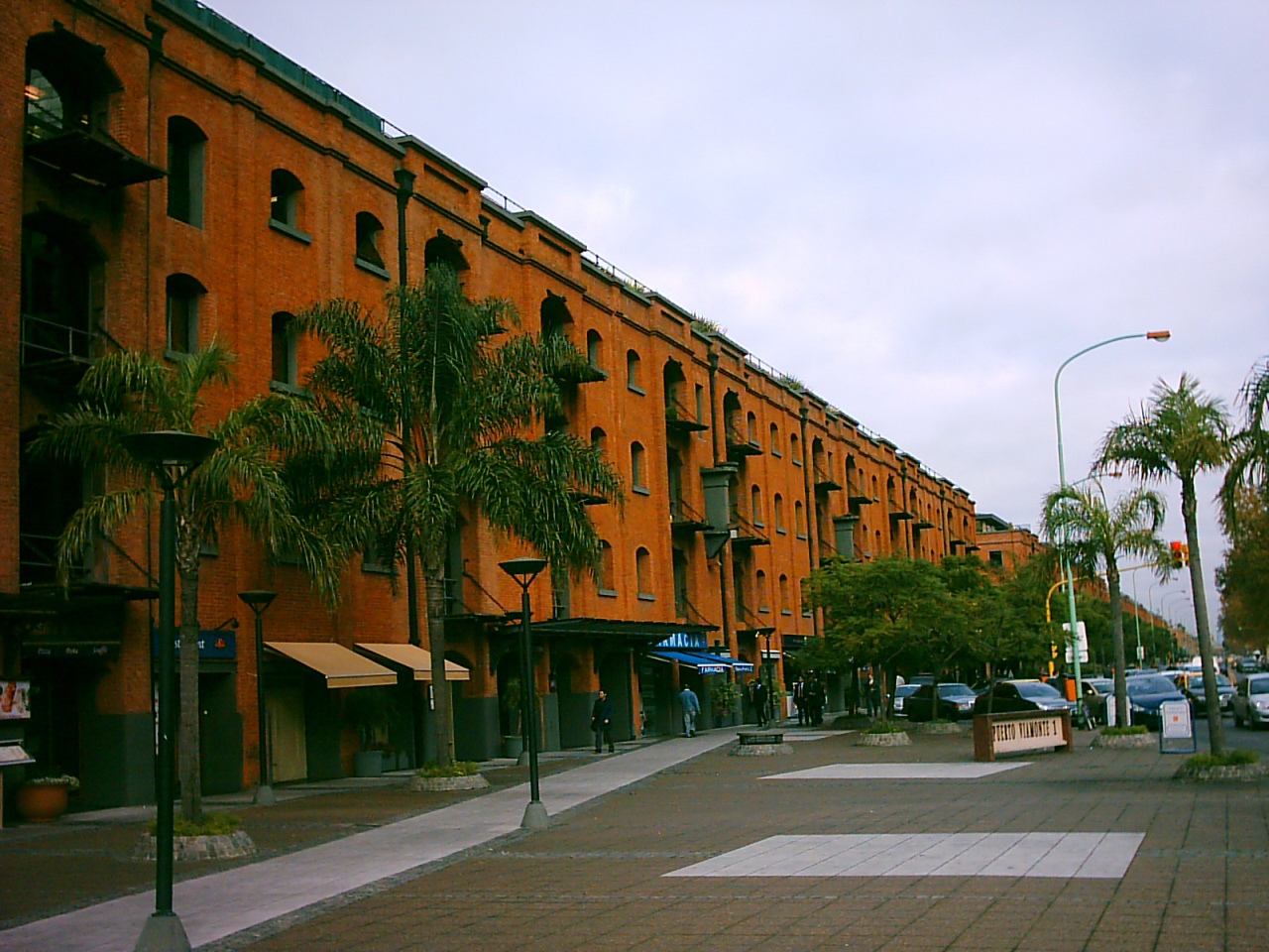 Barrio Puerto Madero, Buenos Aires